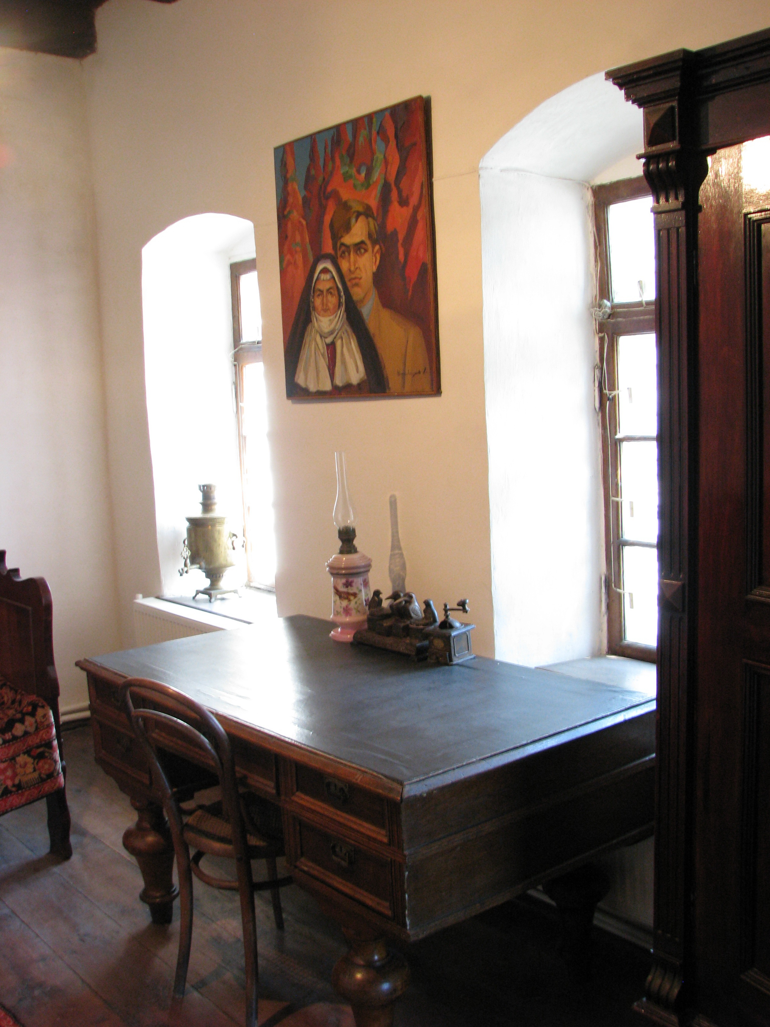 Ակսել Բակունցի տուն-թանգարան 3/156